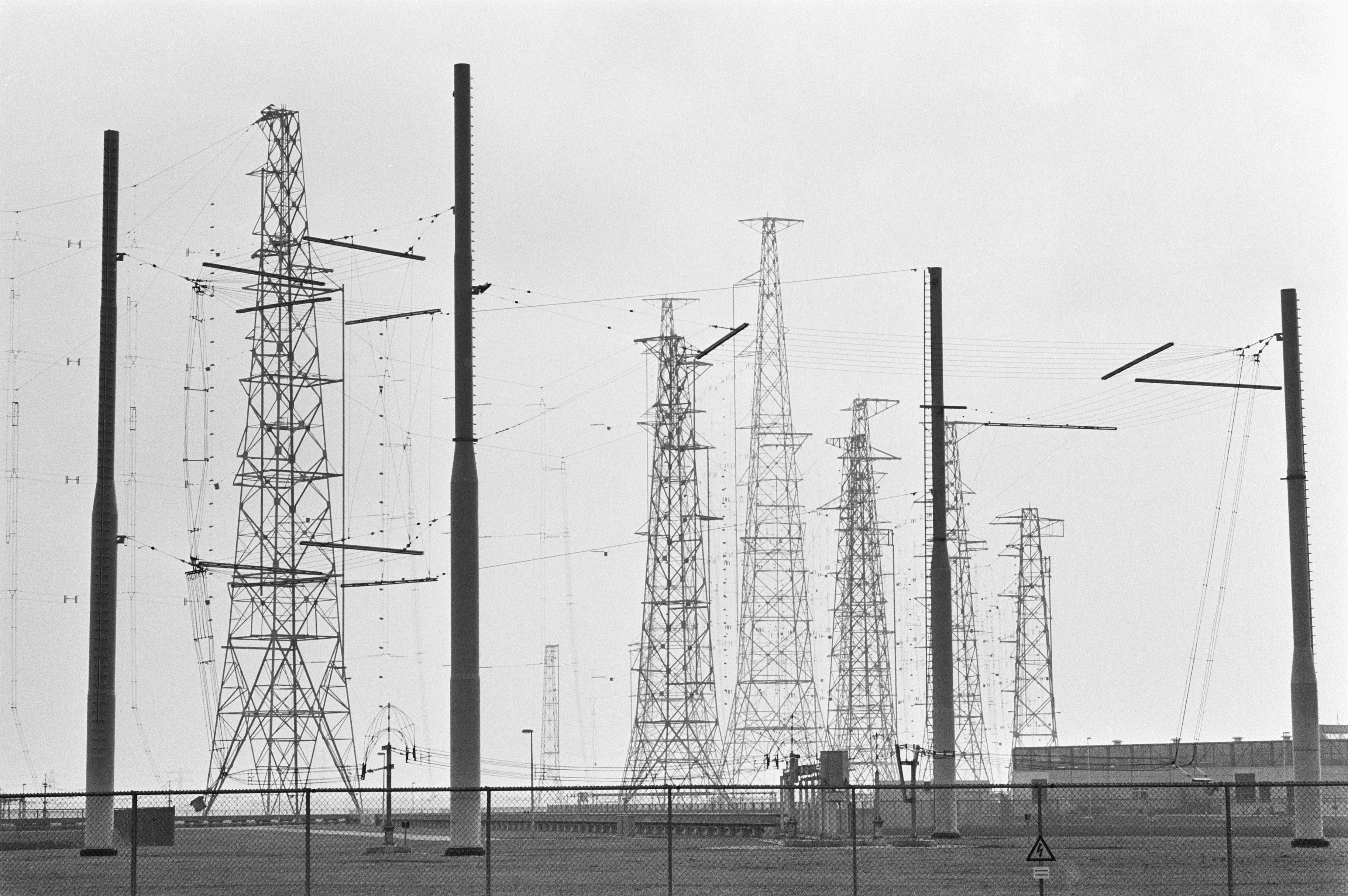 Nieuwe Zenderpark Wereldomroep in de Flevopolder (vanaf 31 maart in gebruik)